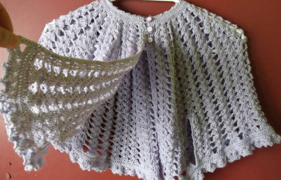 Toquilla de recién nacido. Detalle de un conjunto de ropas de bebé.